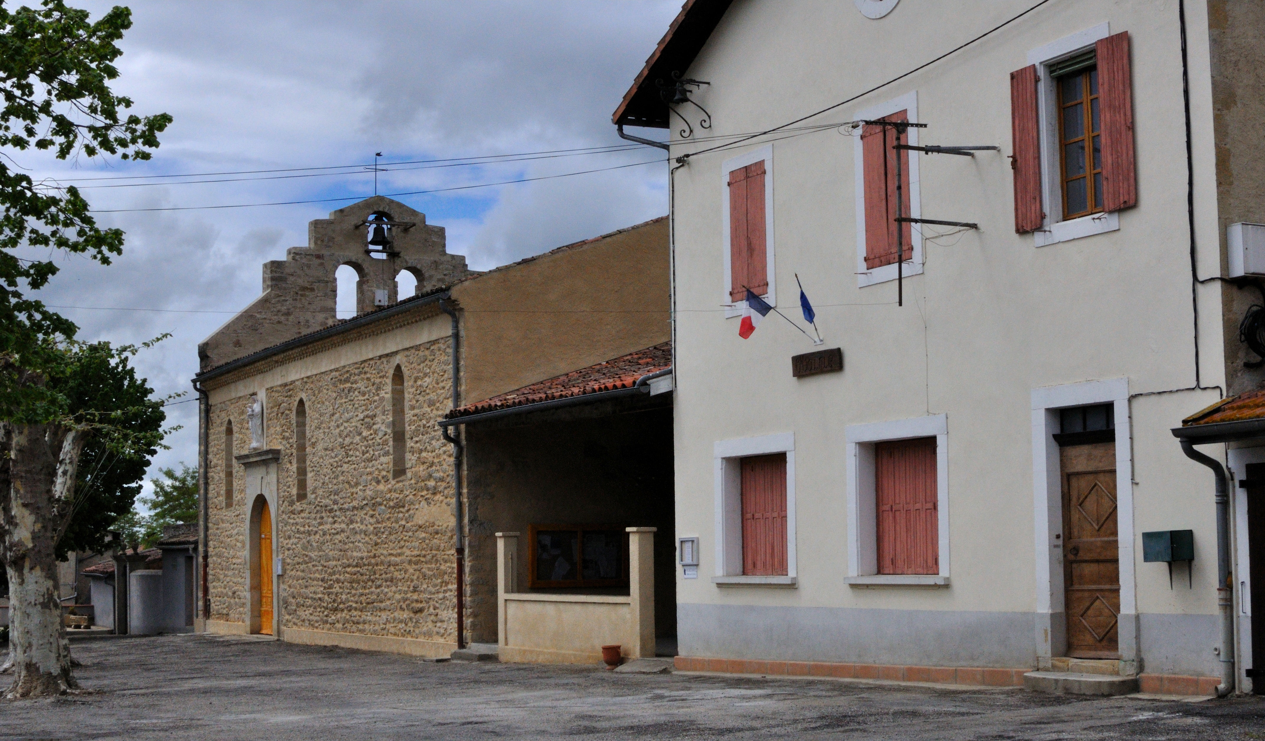 Mairie et église de Besset (Ariège)